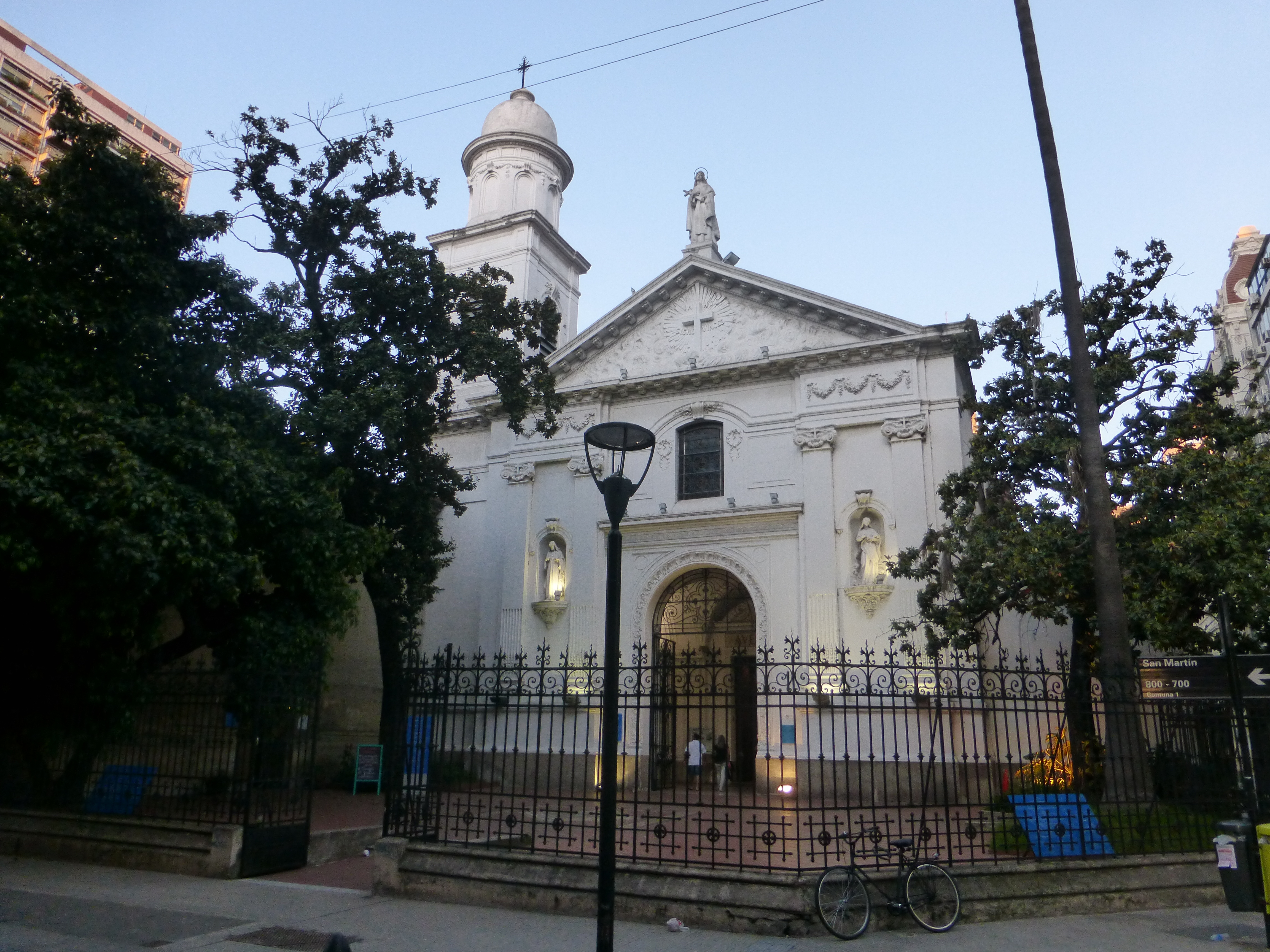 Fachada de la Iglesia Santa Catalina de Siena, ubicada en el barrio porteño de San Nicolás.